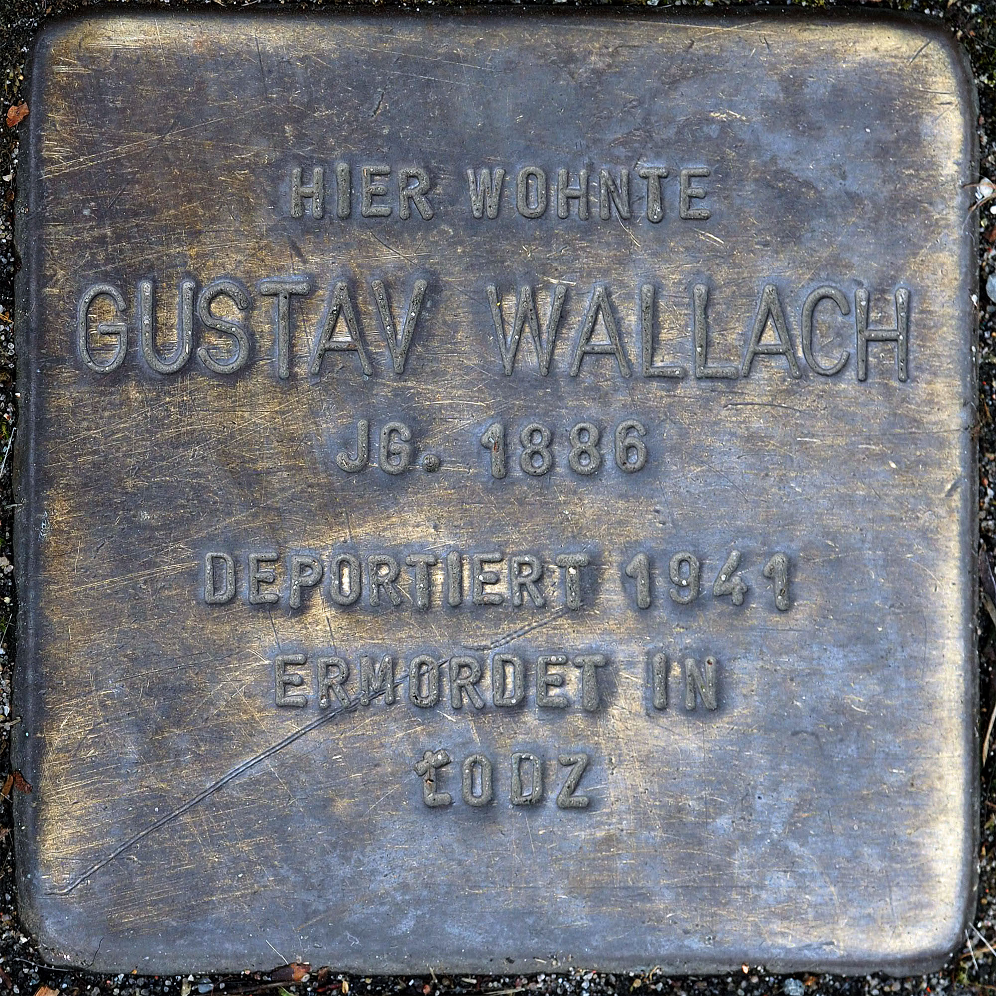 Stolpersteine MG: Wallach, Gustav